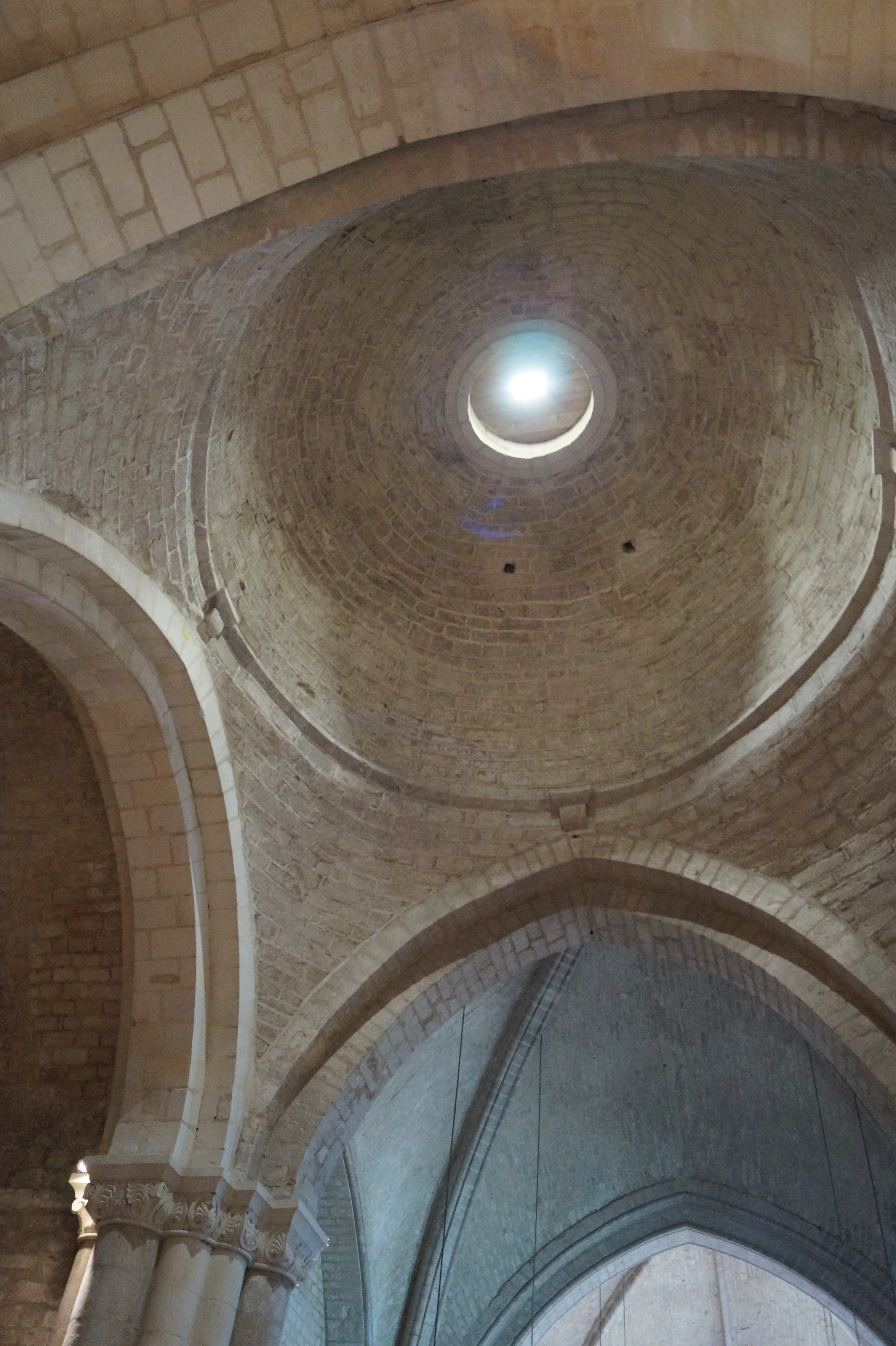 La coupole centrale de l’église Notre-Dame-des-Anges d’Angles.